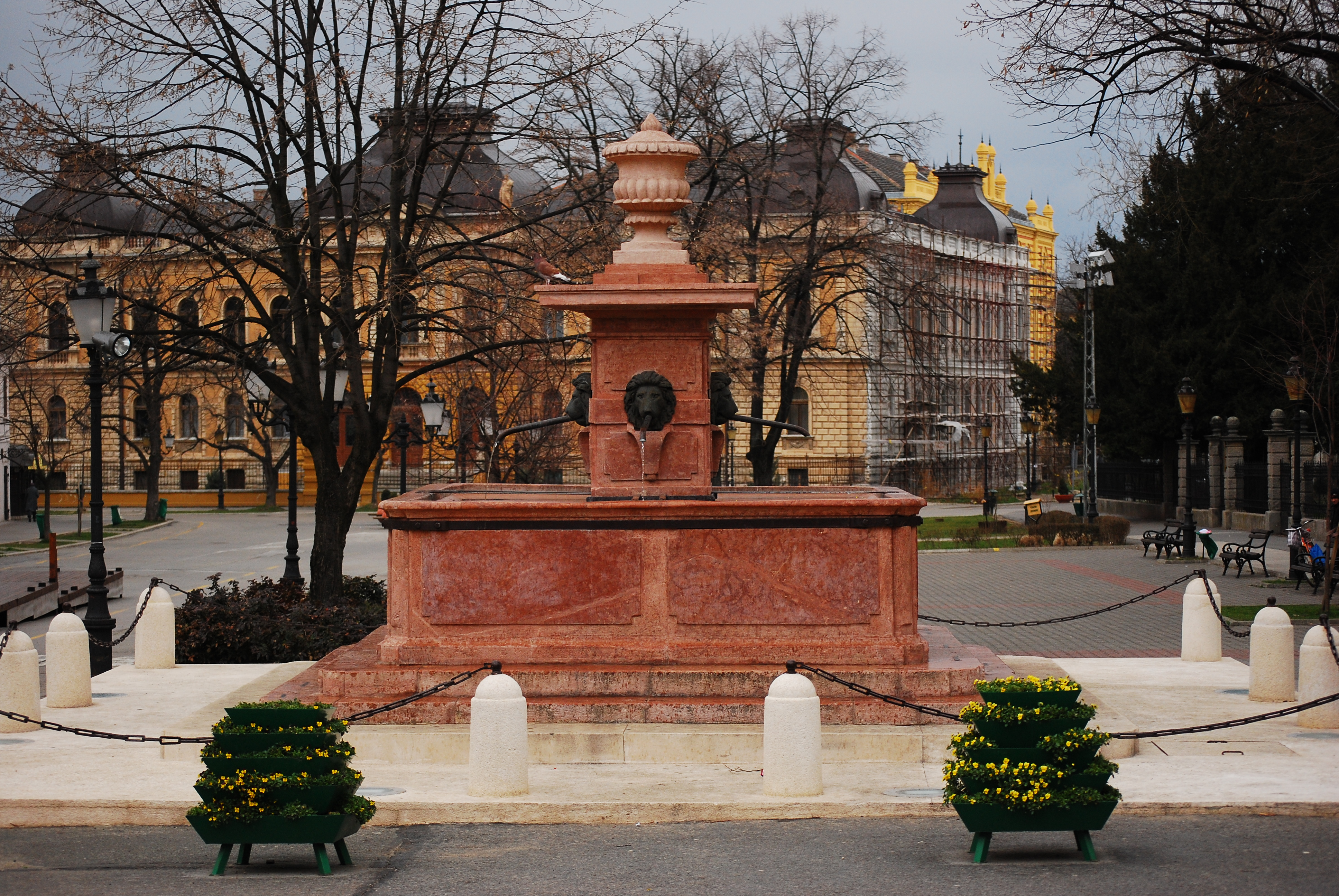 Сремски Карловци